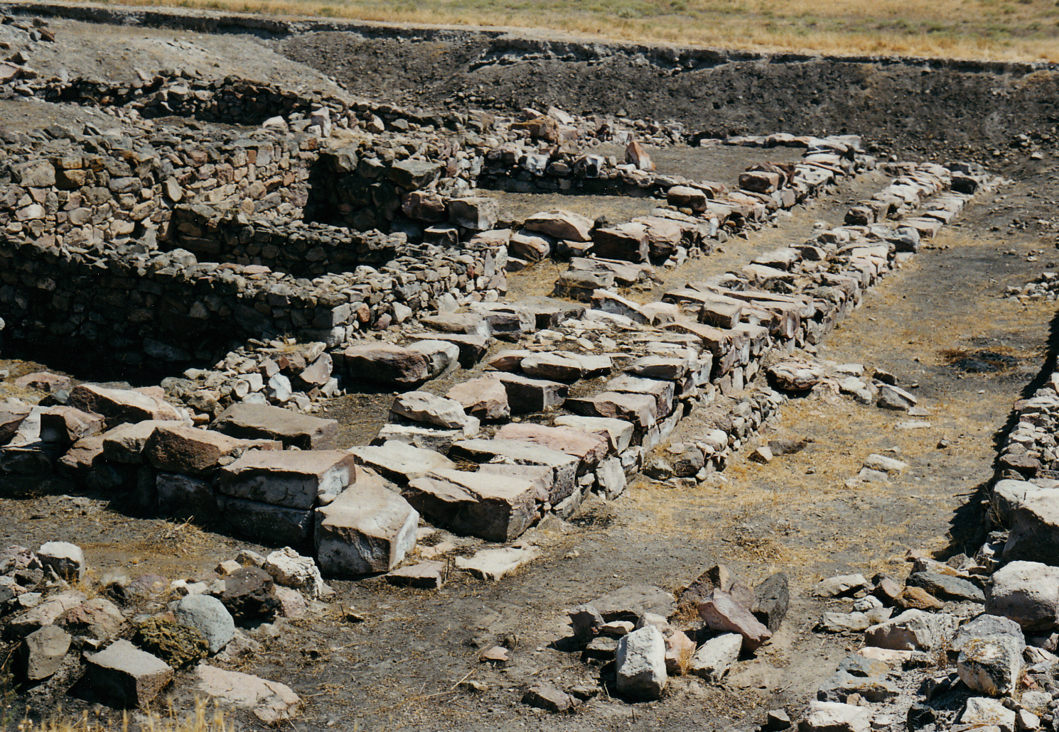 Kültepe-Kanes, bronzezeitlicher Fundort in der Zentraltürkei, Oberstadt, Südwestecke des Palasts auf der Zitadelle